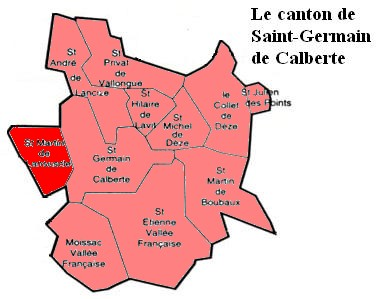 carte de la commune de Saint Martin de Lansuscle dans le canton de Saint Germain de Calberte